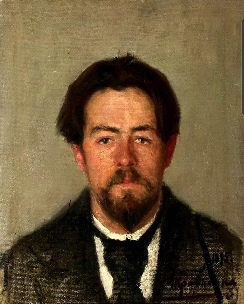 Портрет А.П.Чехова, художник Н.И.Кравченко